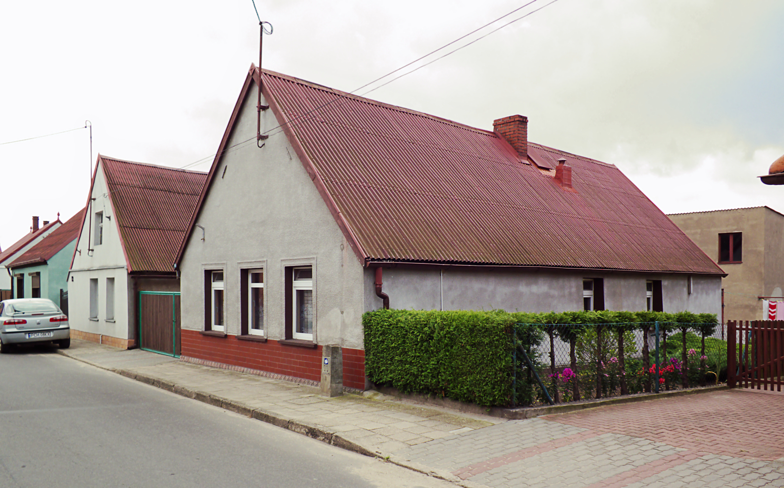 Margonin, dom, ul. Okopowa 10